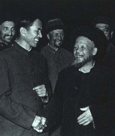 1964-11 1964年 左侧为新疆副主席铁木尔·达瓦买提